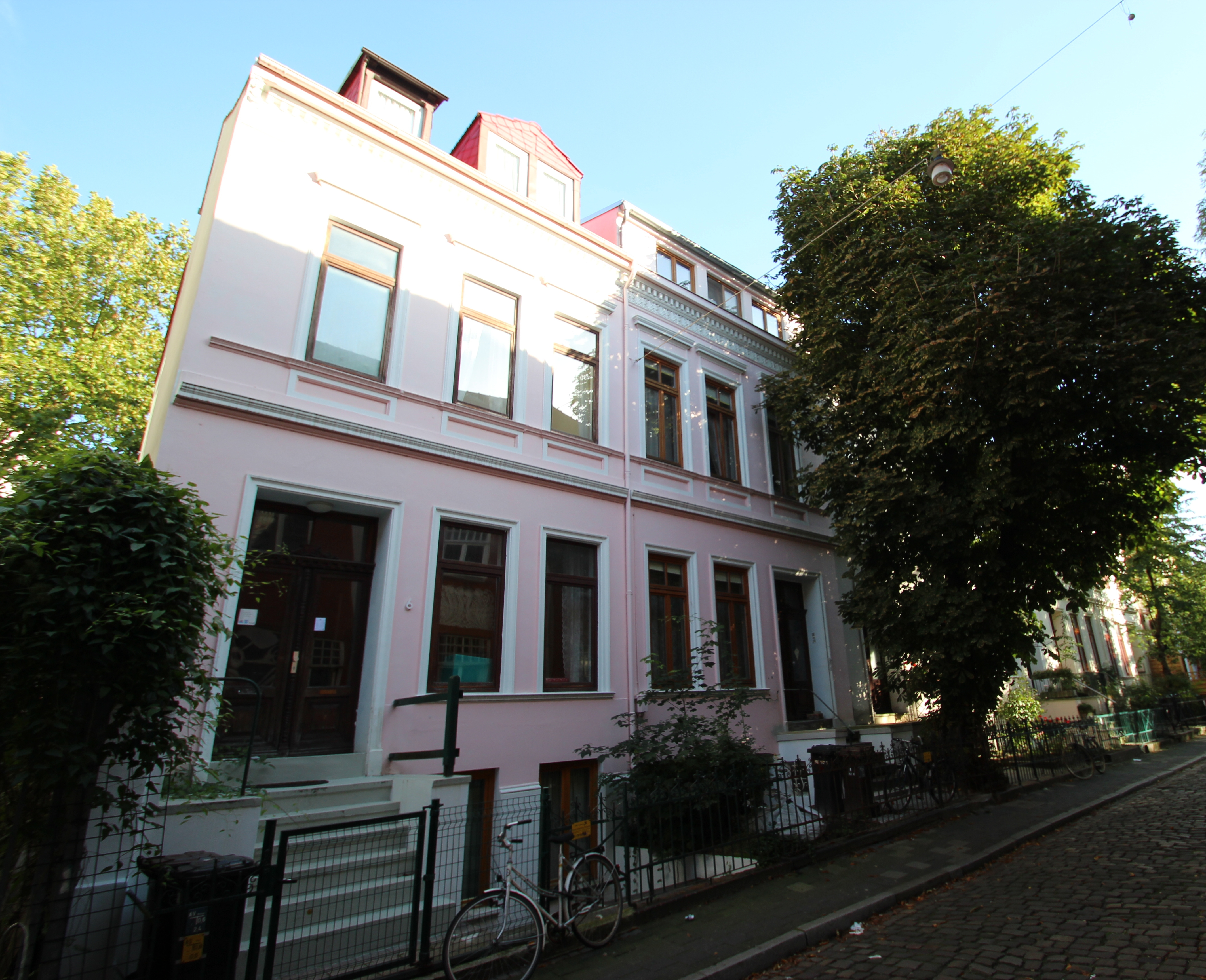 Wohnhausgruppe in Bremen, WeberstraßeDie Denkmalgruppe ist ein geschütztes Kulturdenkmal in der Freien Hansestadt Bremen, mit der Nr. 1202 beim Landesamt für Denkmalpflege registriert.